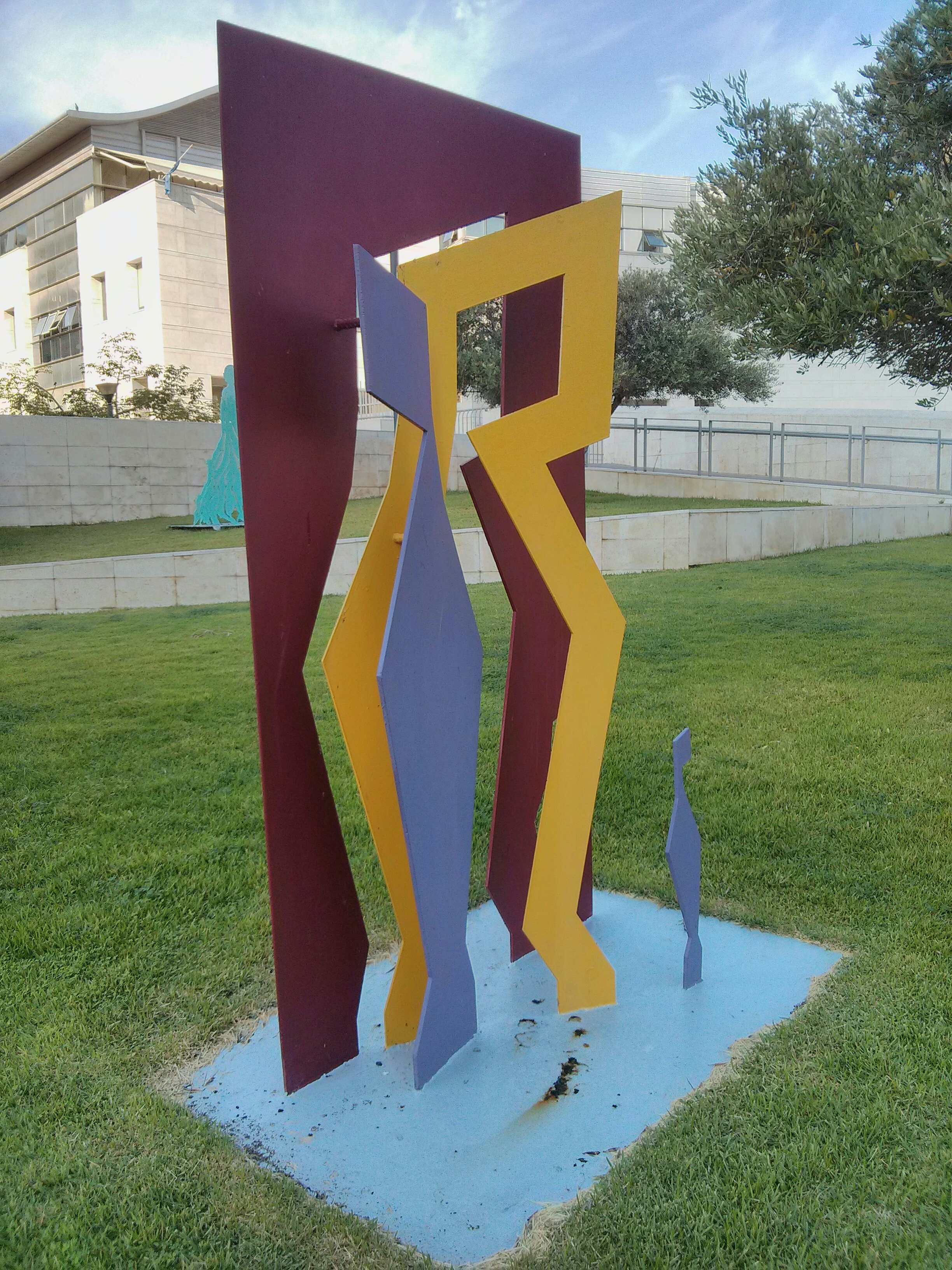 פסל ברזל על משטח בטון. גובהו 2 מטרים. מוצב בסמוך לבניין הביטוח הלאומי בחולון.